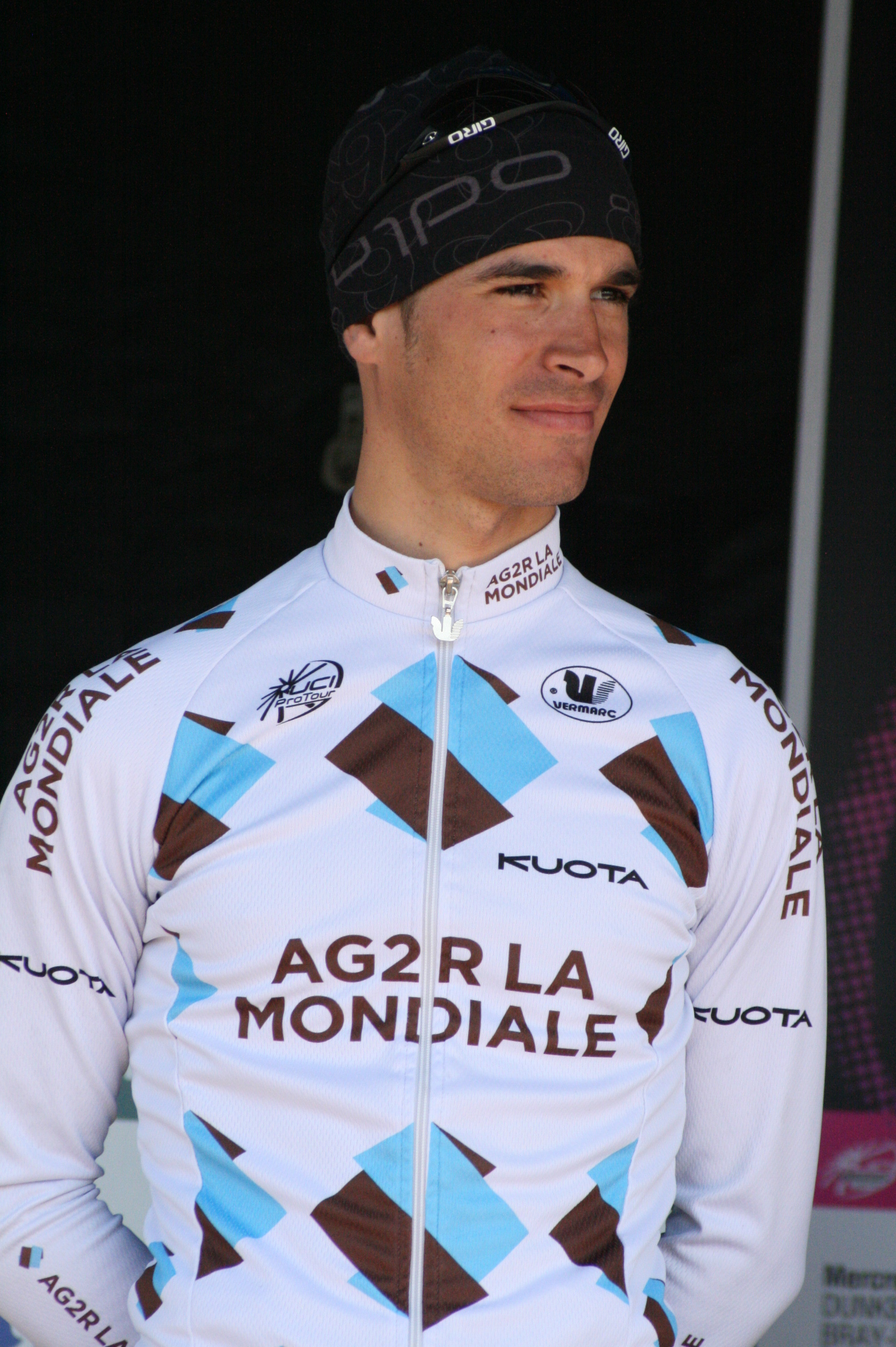 Lloyd Mondory, lors de la présentation des équipes des 4 jours de Dunkerque 2010